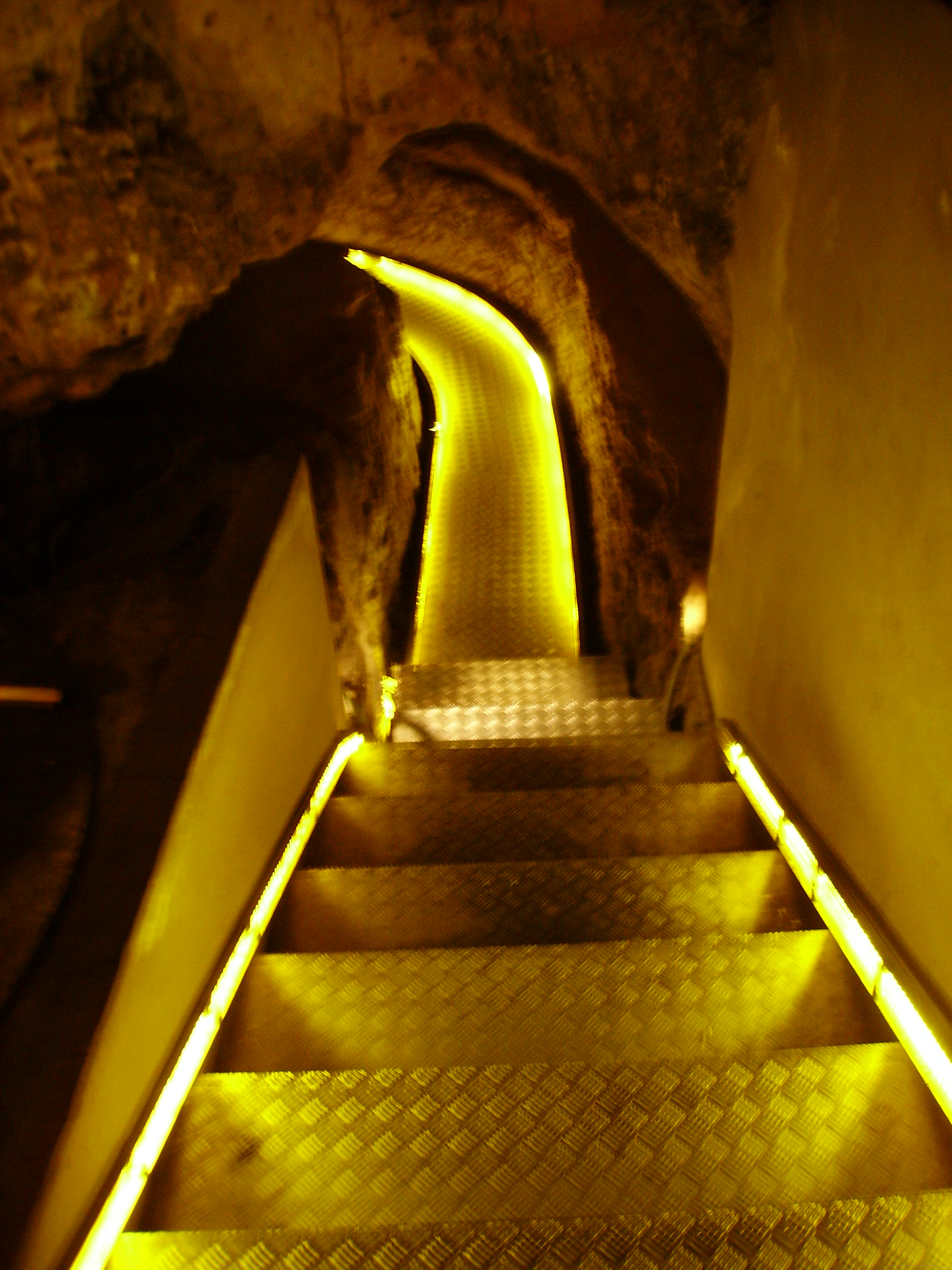 Cueva de Nerja